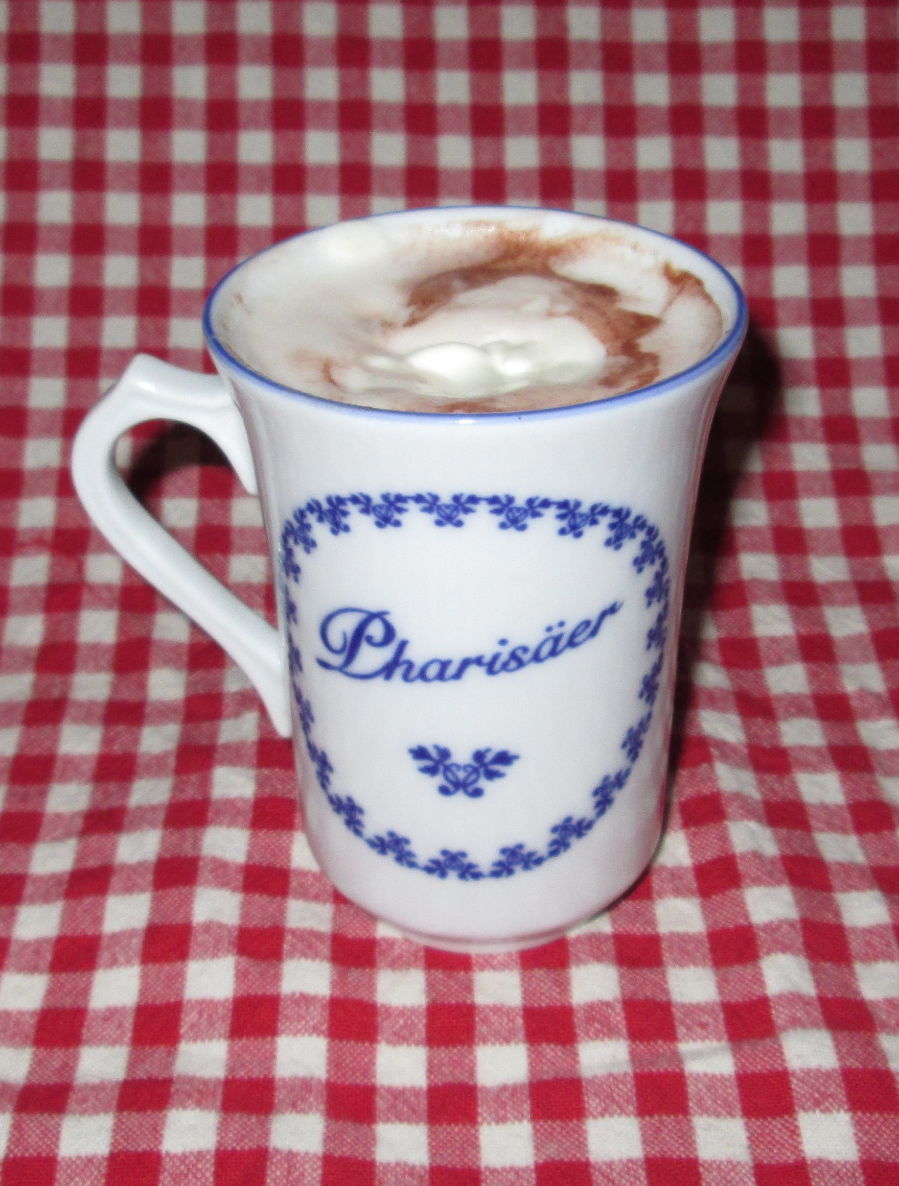 En kop farisæer